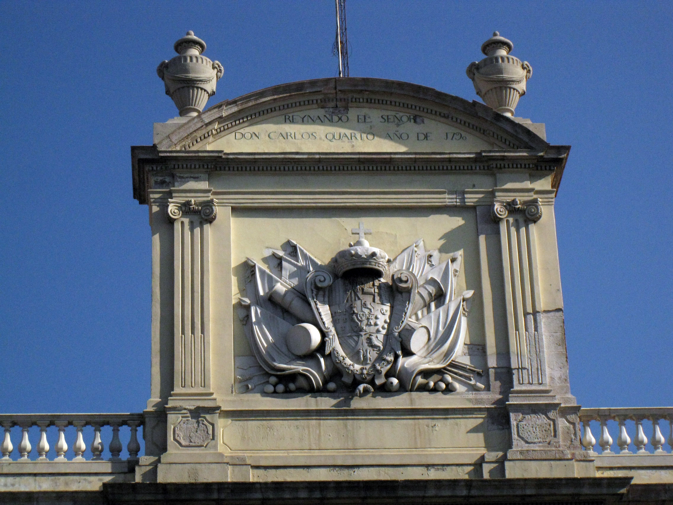 Subdelegació del Govern (Barcelona), antic edifici de la Duana, construït pel comte de Roncali entre el 1790 i el 1792. Escut de Carles IV al frontó del cos central de la façana de l'avinguda del Marquès de l'Argentera.